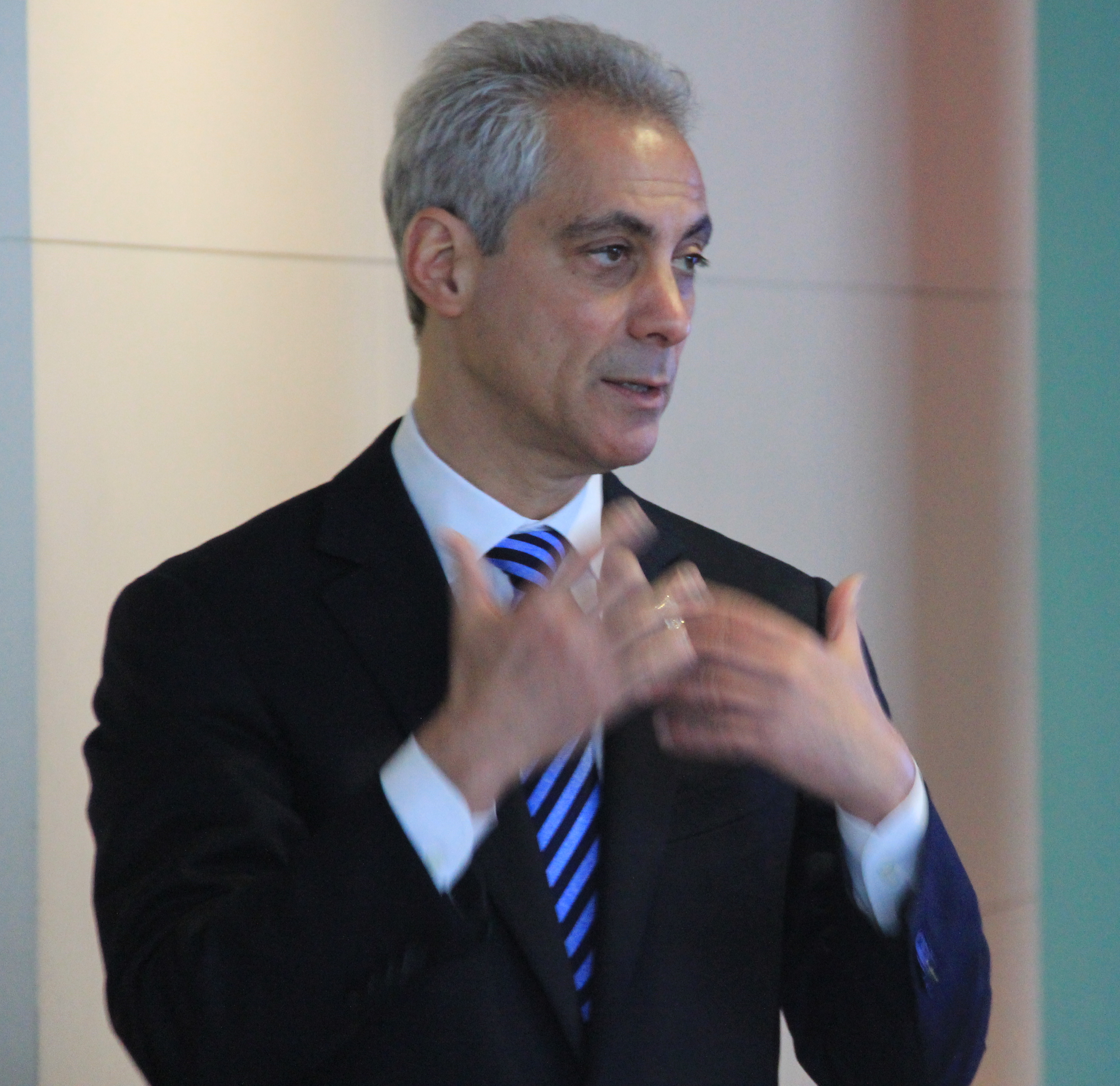 Rahm Emanuel, Gesticulating